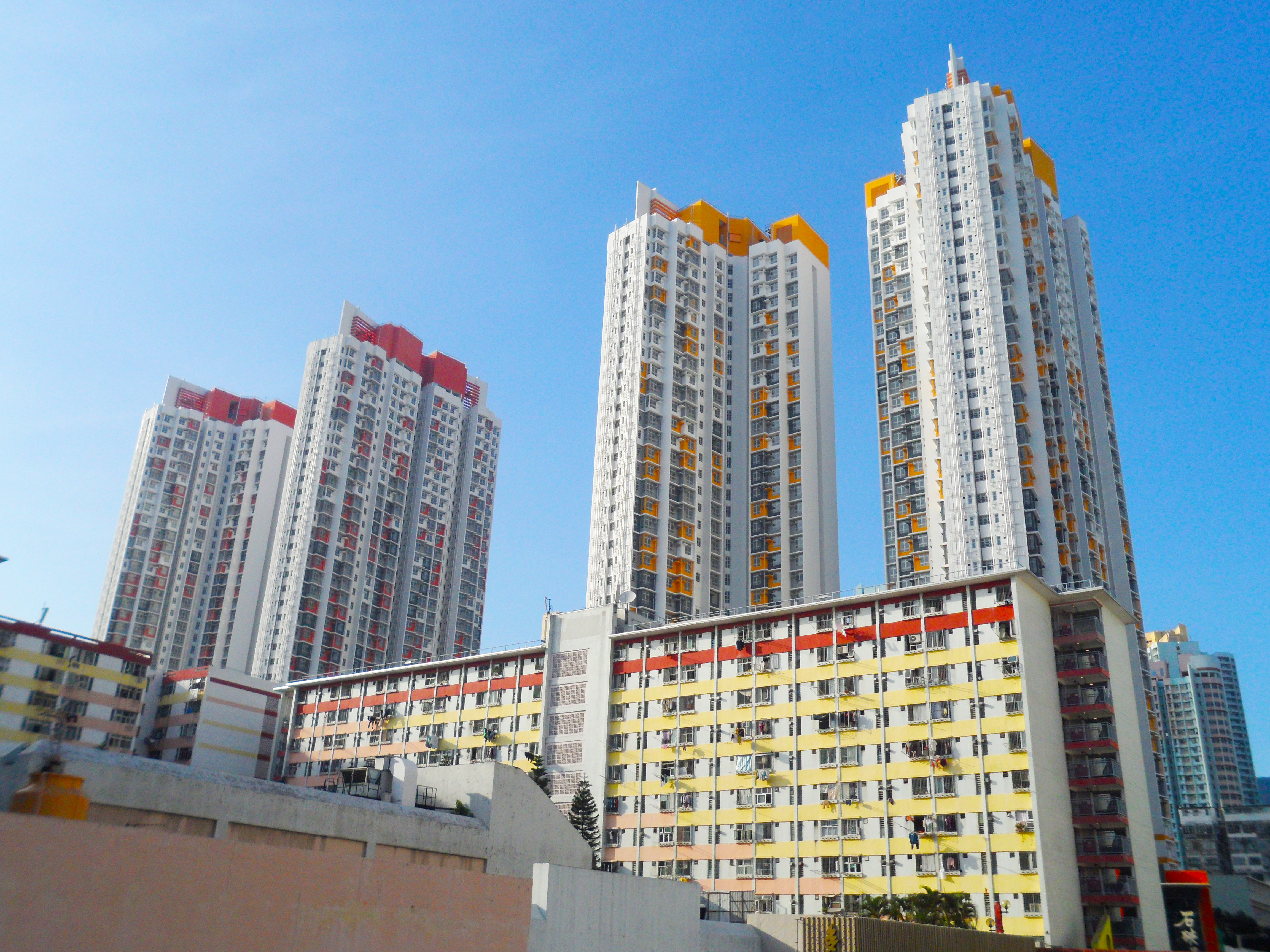 石硤尾邨美益樓、美賢樓、美笙樓及美盛樓，前方樓宇為美虹樓及美彩樓